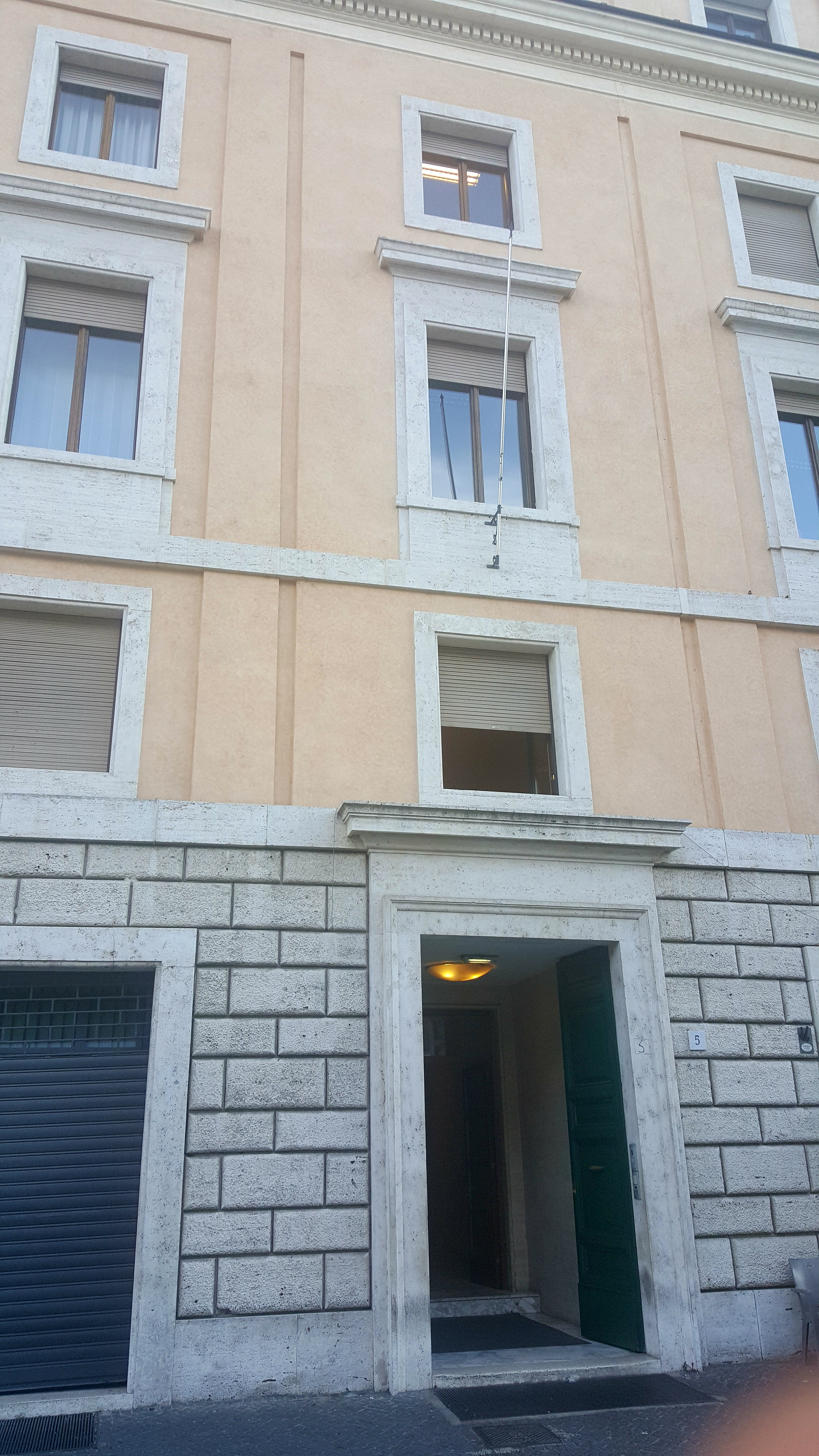 Sede del Pontificio Collegio della Cultura a Roma, Via della Conciliazione 5